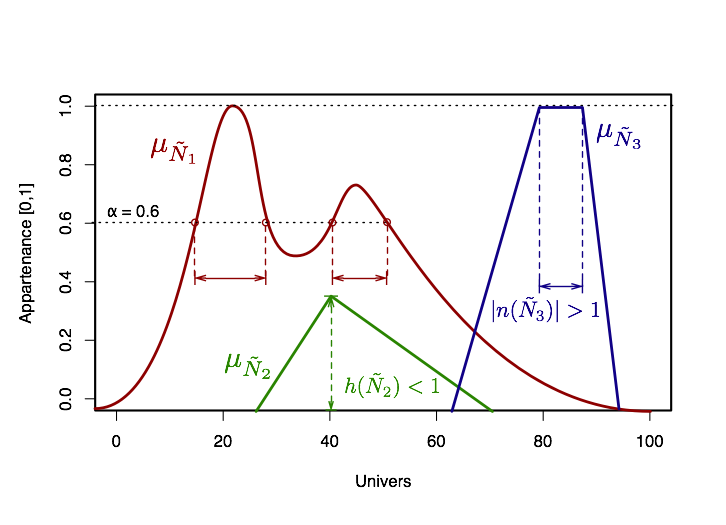 Illustre différents d'ensembles flous qui ne peuvent pas être considérés comme des nombres flous (nombre non convexes, nombre non normalisé, et intervalle)